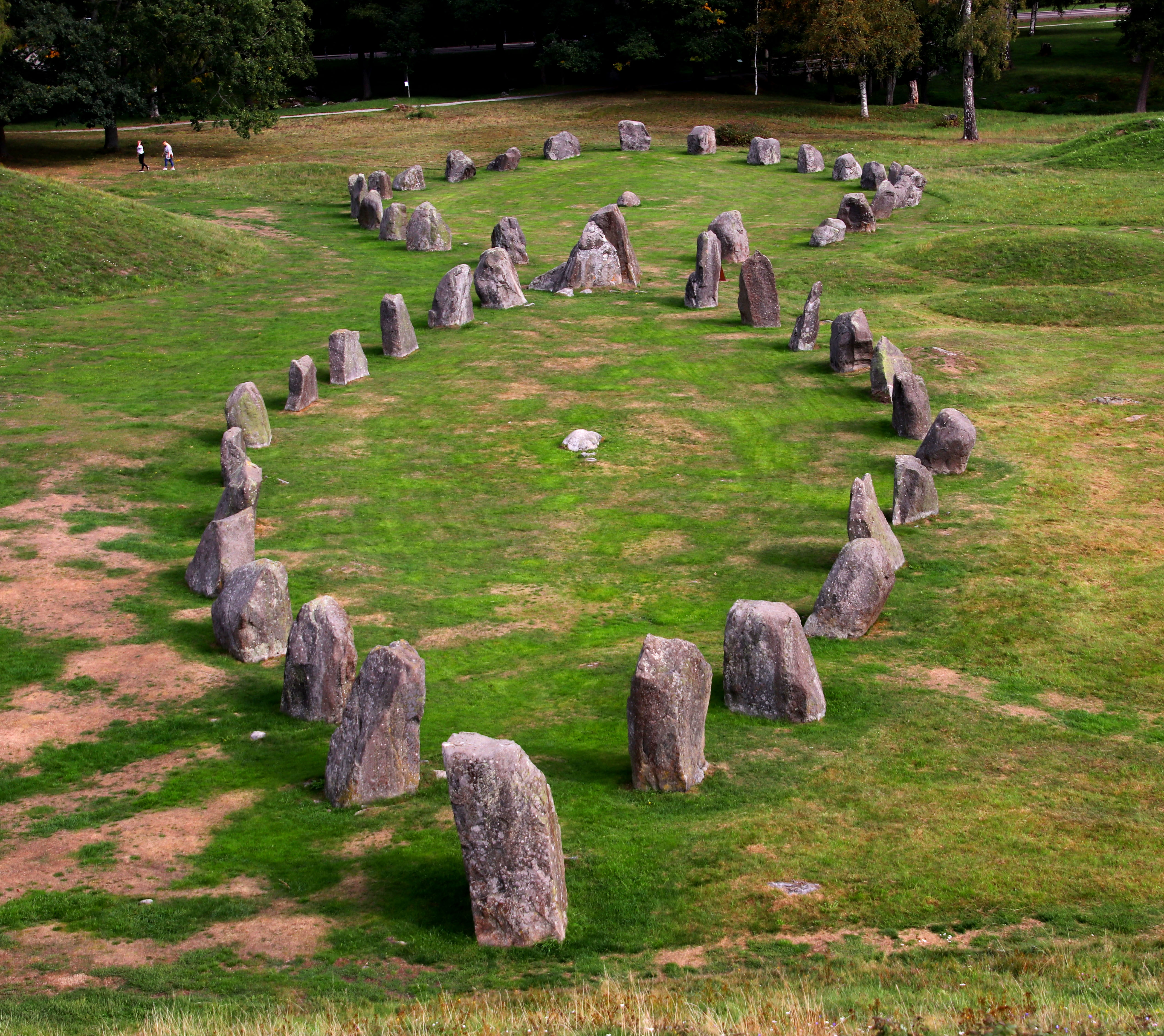 Västerås. Skeppssättningen vid Kung Anunds hög.